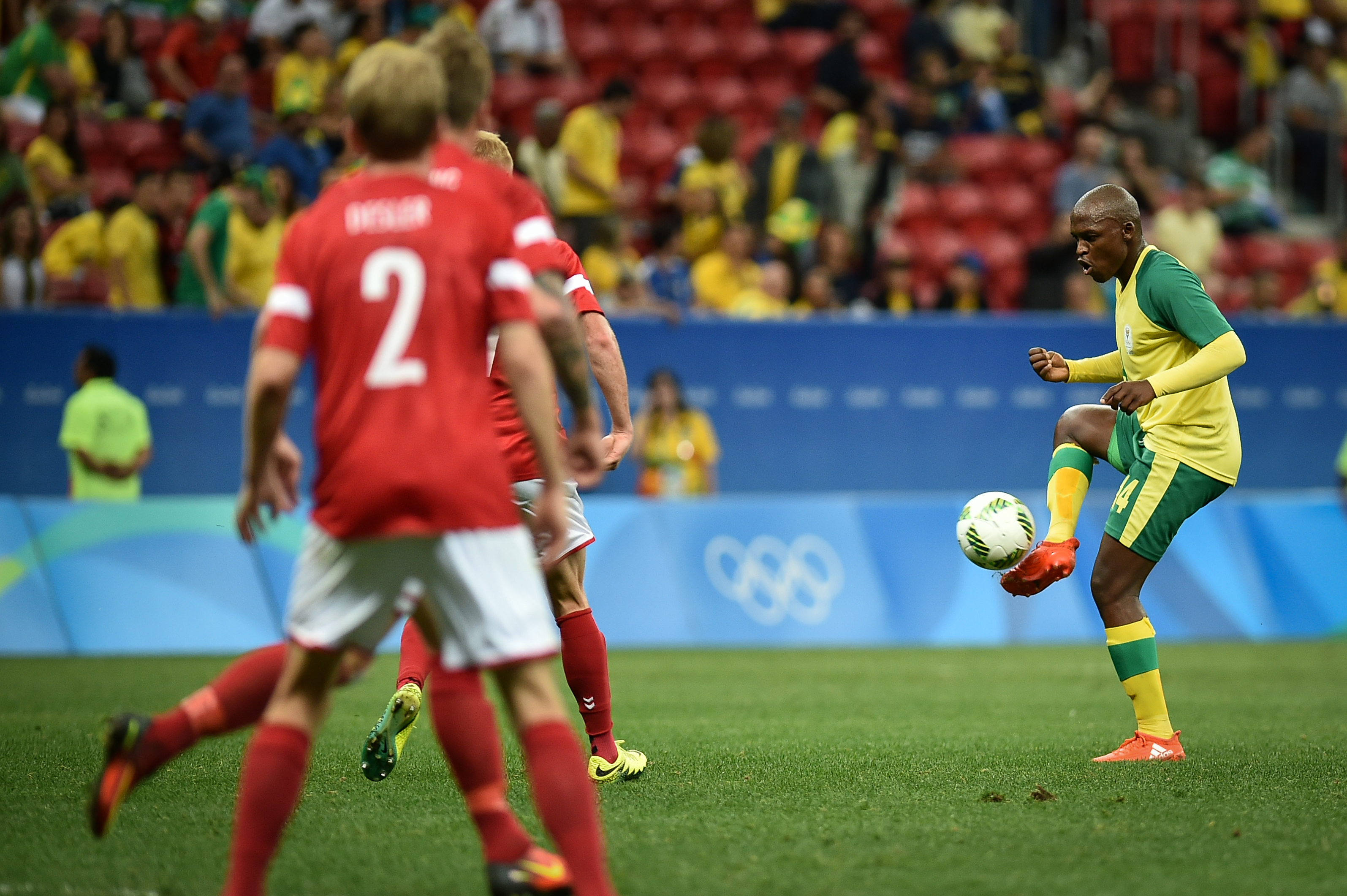 Estádio Nacional de Brasília Mané Garrincha, Brasília, DF, Brasil, 7/8/2016 Foto: Andre Borges/Agência Brasília. Dinamarca e África do Sul jogam neste domingo (7), no Estádio Mané Garrincha, pelo grupo A do futebol masculino nas Olimpíadas 2016. A Dinamarca venceu a África do Sul por 1x0, com gol de Robert Skov no segundo tempo.